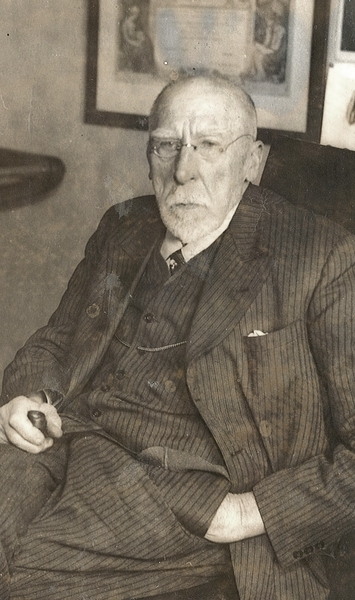 portrett, mann, overlærer, maler, grafiker, sittende knefigur, pipe.